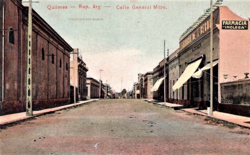 Pueblo de Quilmes hacia 1900.